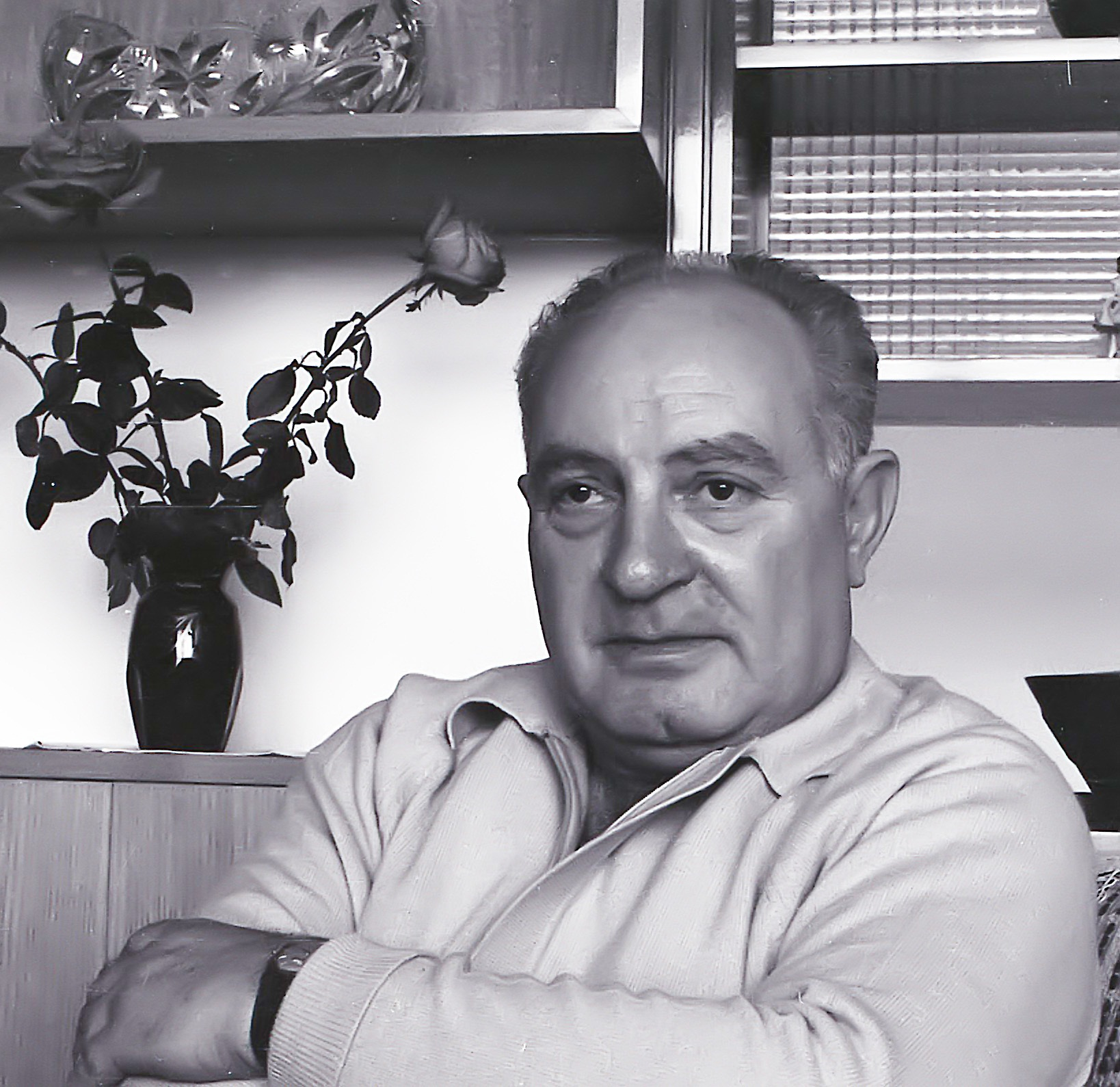 עזרא המנחם